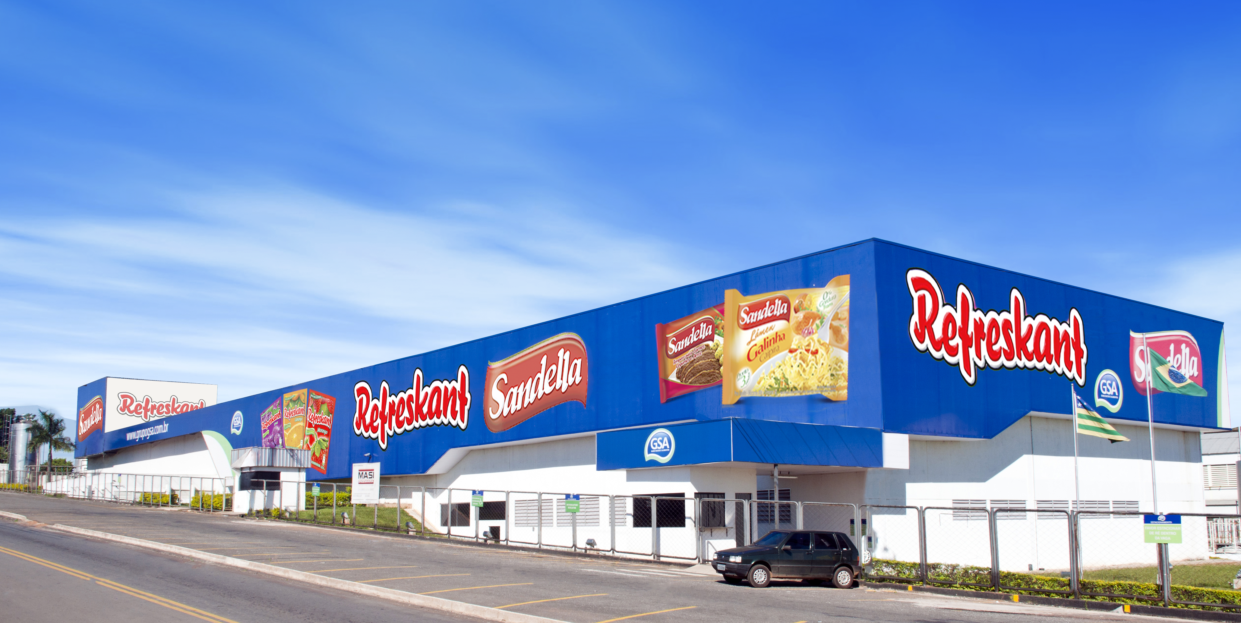 Fachada 2012